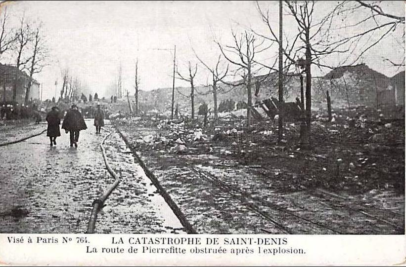 Saint-Denis. La route de Pierrefitte lors de la "Catastrophe"